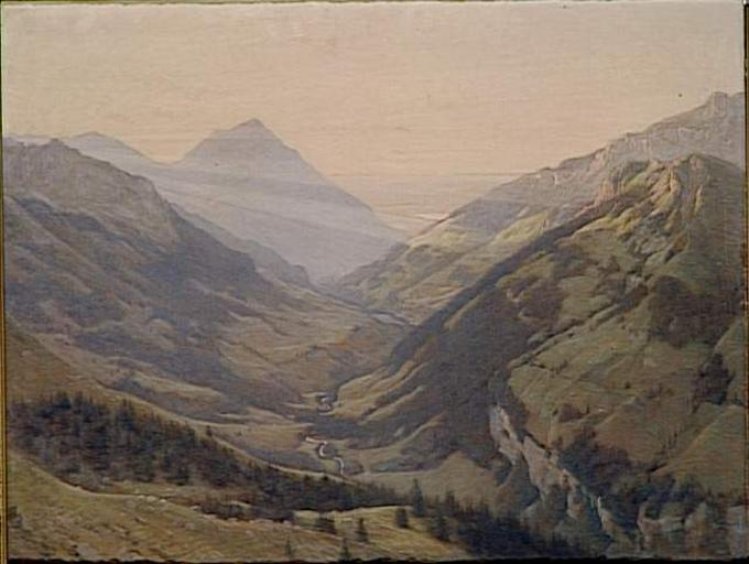 Tableau du peintre Auguste Baud-Bovy : la fin d'un jour (1895), musée d'Orsay